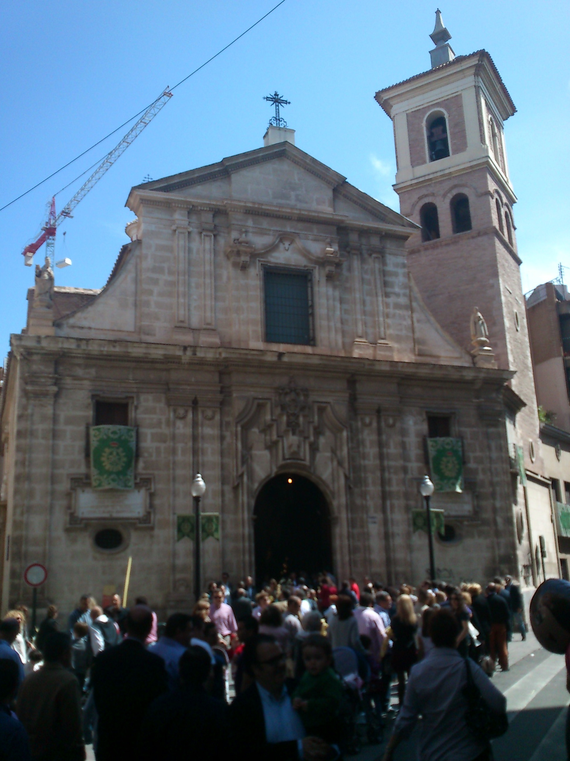 Fachada principal de la Iglesia de San Pedro de Murcia (España). Siglo XVII.